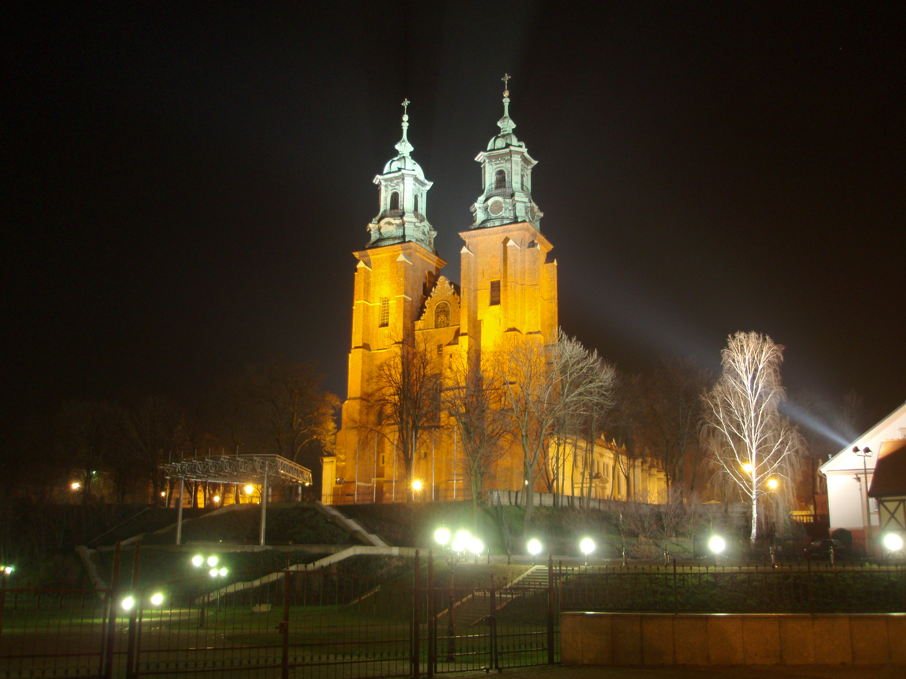 Archikatedra Gnieźnieńska